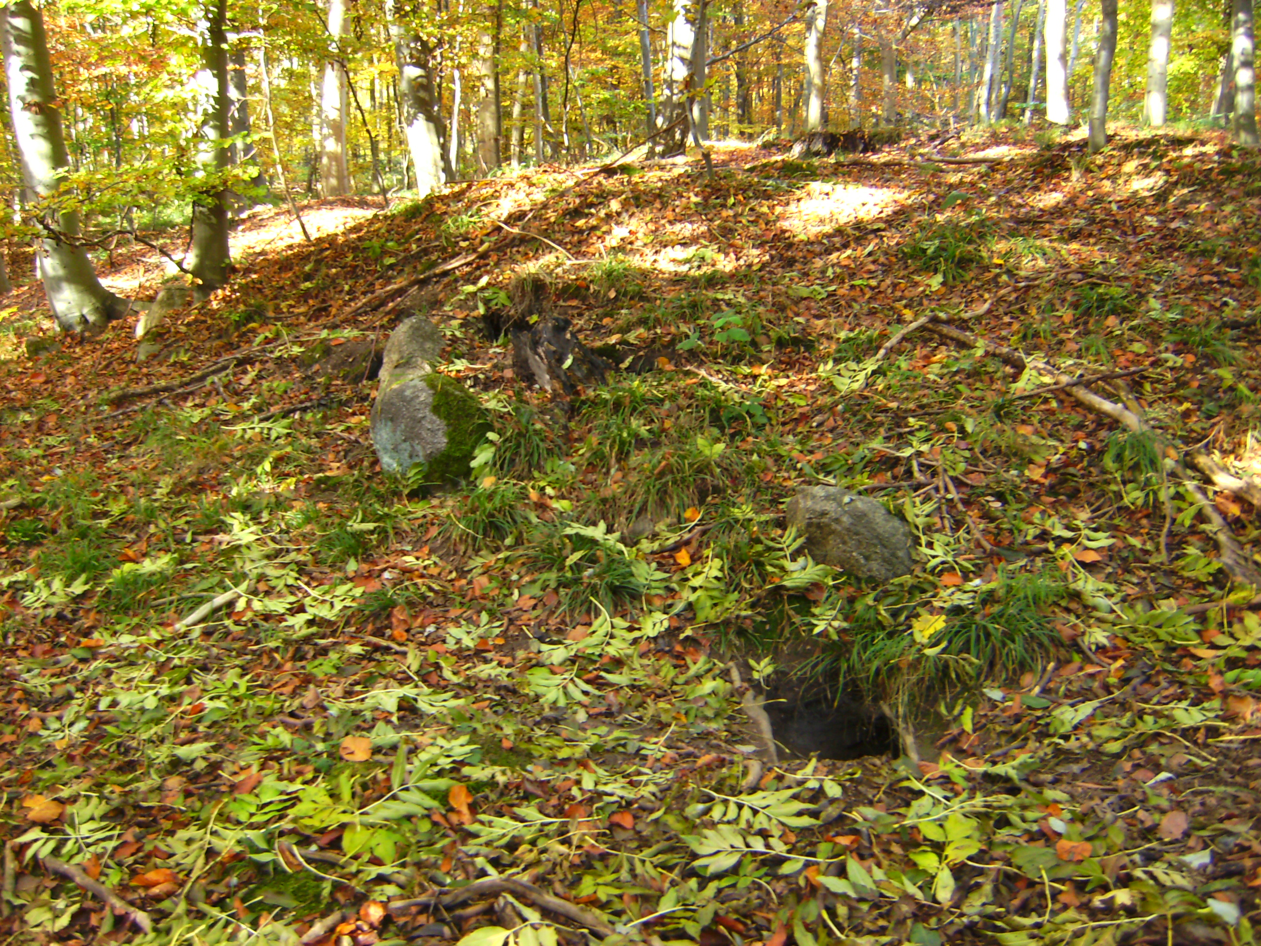 Oldtidsgrav i i Høvænge Skov, vest for Nytsed Dolmen near Nysted, Denmark